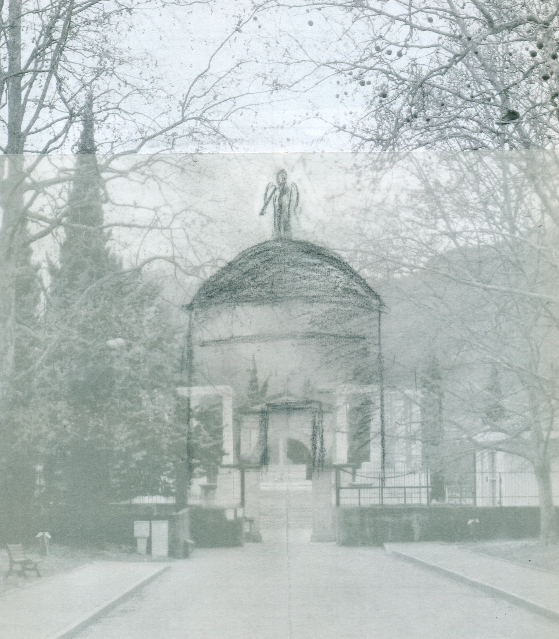 Immagine attuale dell'ingresso del cimitero con sovrapposta una sagoma ideale per far immaginare come apparirebbe ad un visitatore odierno. Le dimensioni sono simili alle dimensioni reali della cappella prima che venisse abbattuta dopo i bombardamenti del 1945